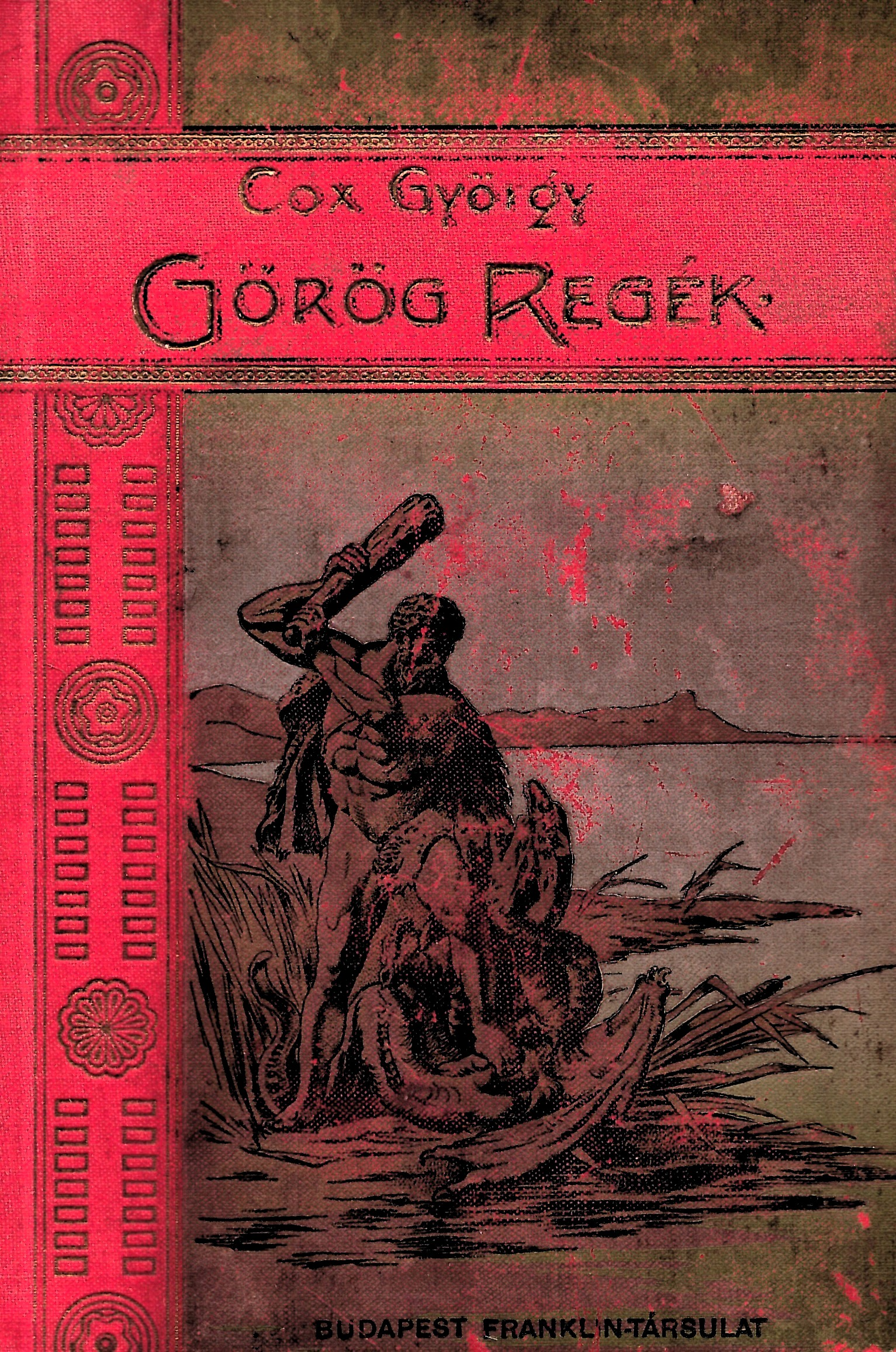 Cox György (George William Cox [1827-1902]): Görög regék (1911)